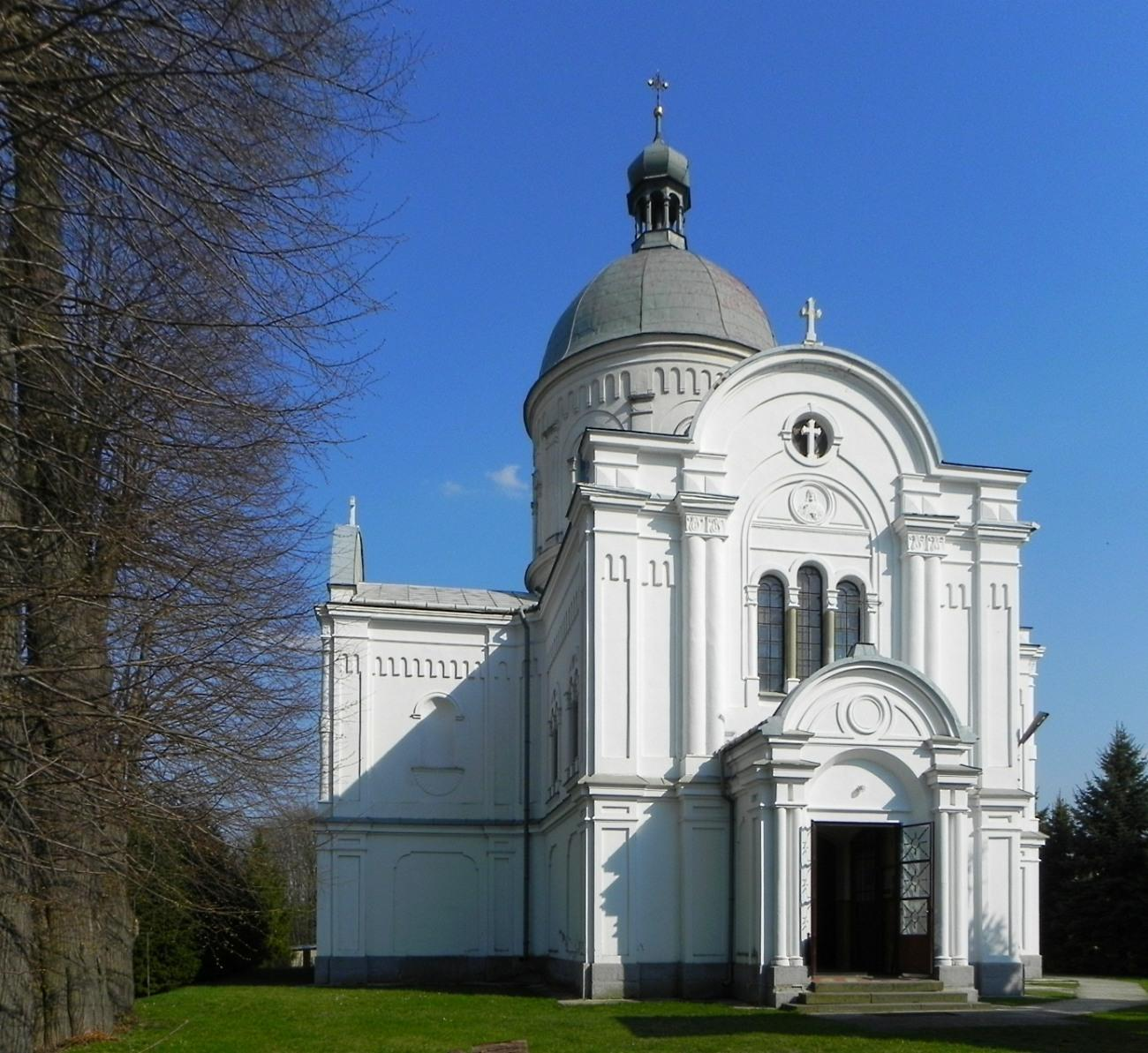 Nowe Sioło - dawna cerkiew greckokatolicka pw. Eliasza Proroka, obecnie kościół rzymskokatolicki parafialny pw. Wniebowzięcia NMP (zabytek nr A-73 z 04.06.2003)